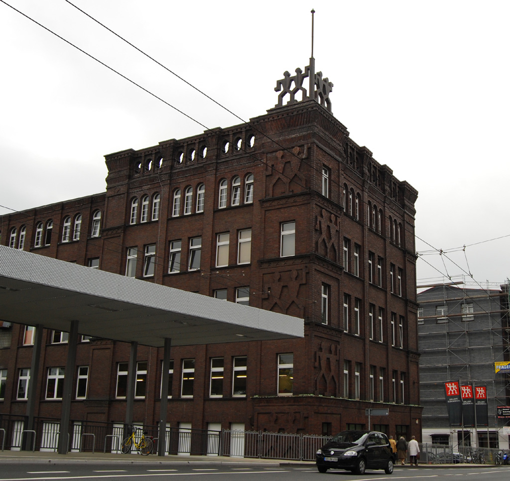 Solinger Firmengebäude der ZWILLING J.A. Henckels AG